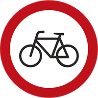 Diagramme de la signalisation routière luxembourgeoise